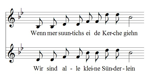 Vergleich der Melodieanfänge von Wenn mer suuntichs ei de Kerche giehn und Wir sind alle kleine Sünderlein